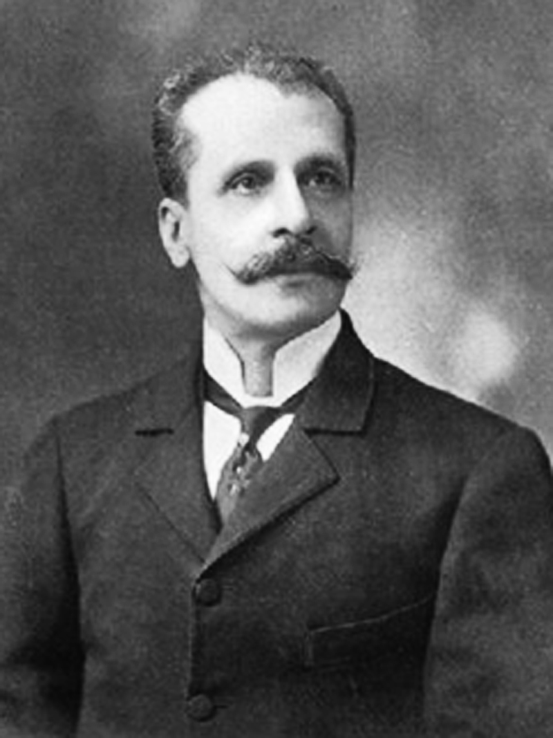 Manuel Candamo esta fotografia 1903